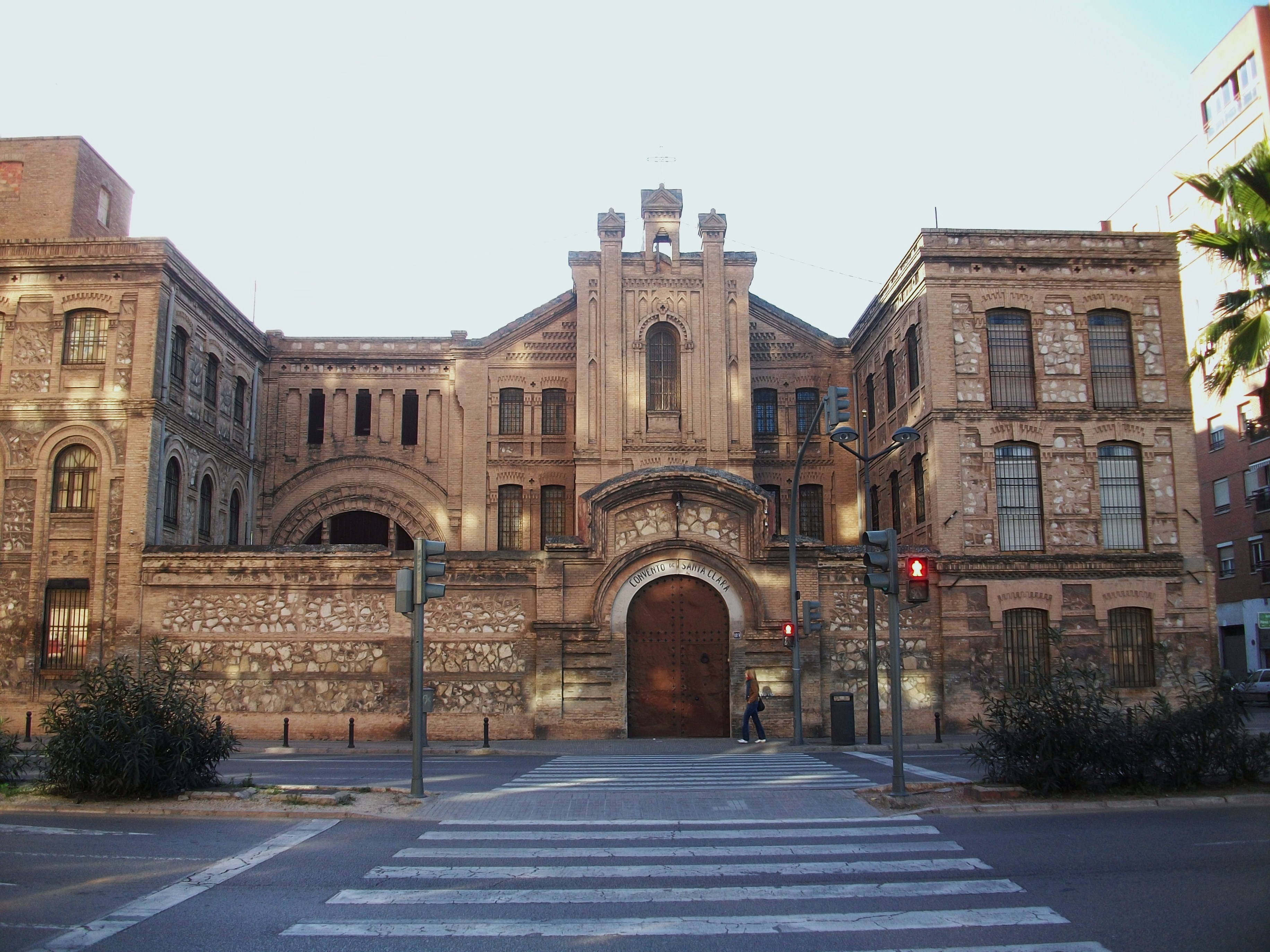 Convent de santa Clara de València.